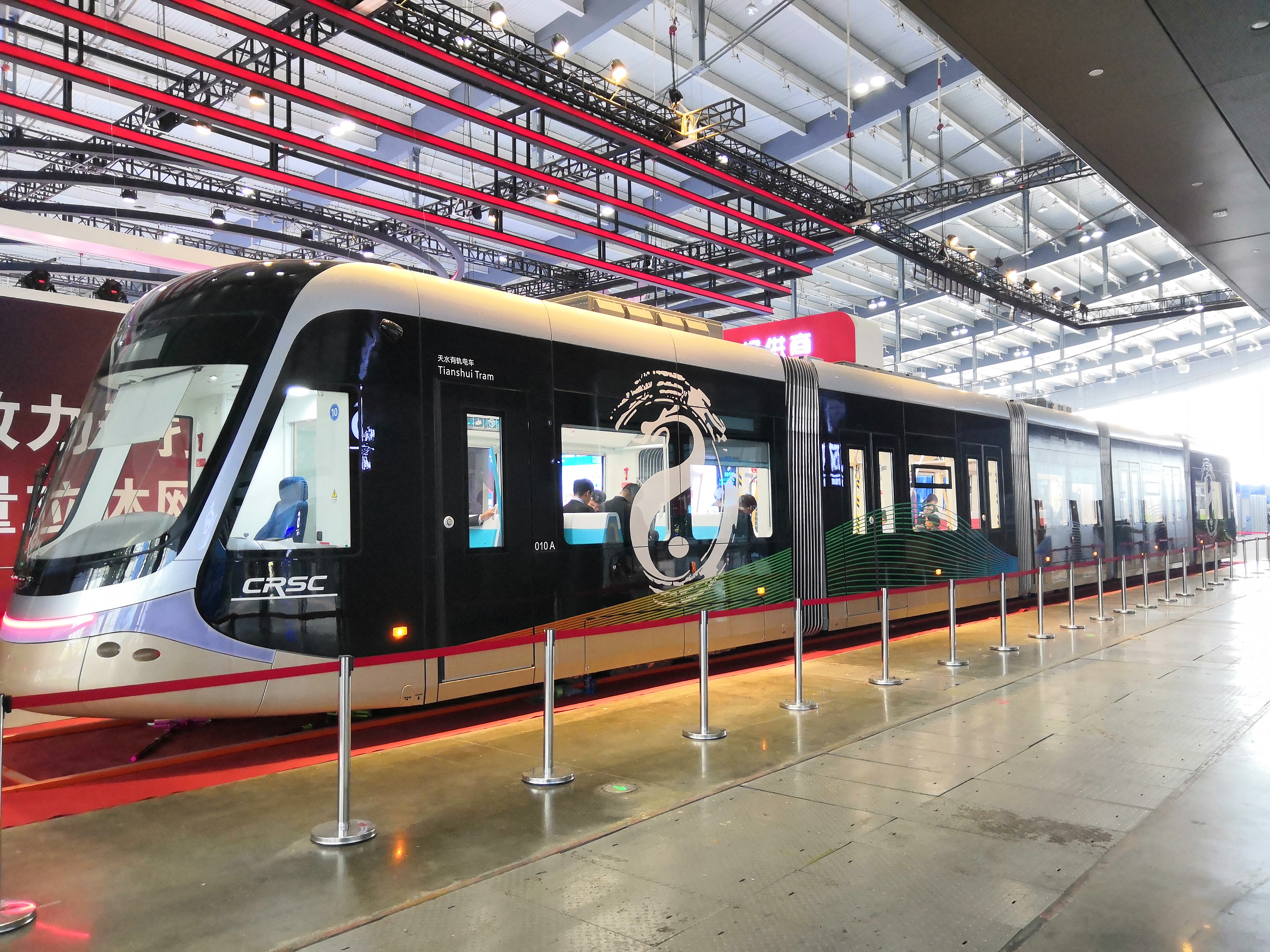 中文（中国大陆）: 天水无轨电车